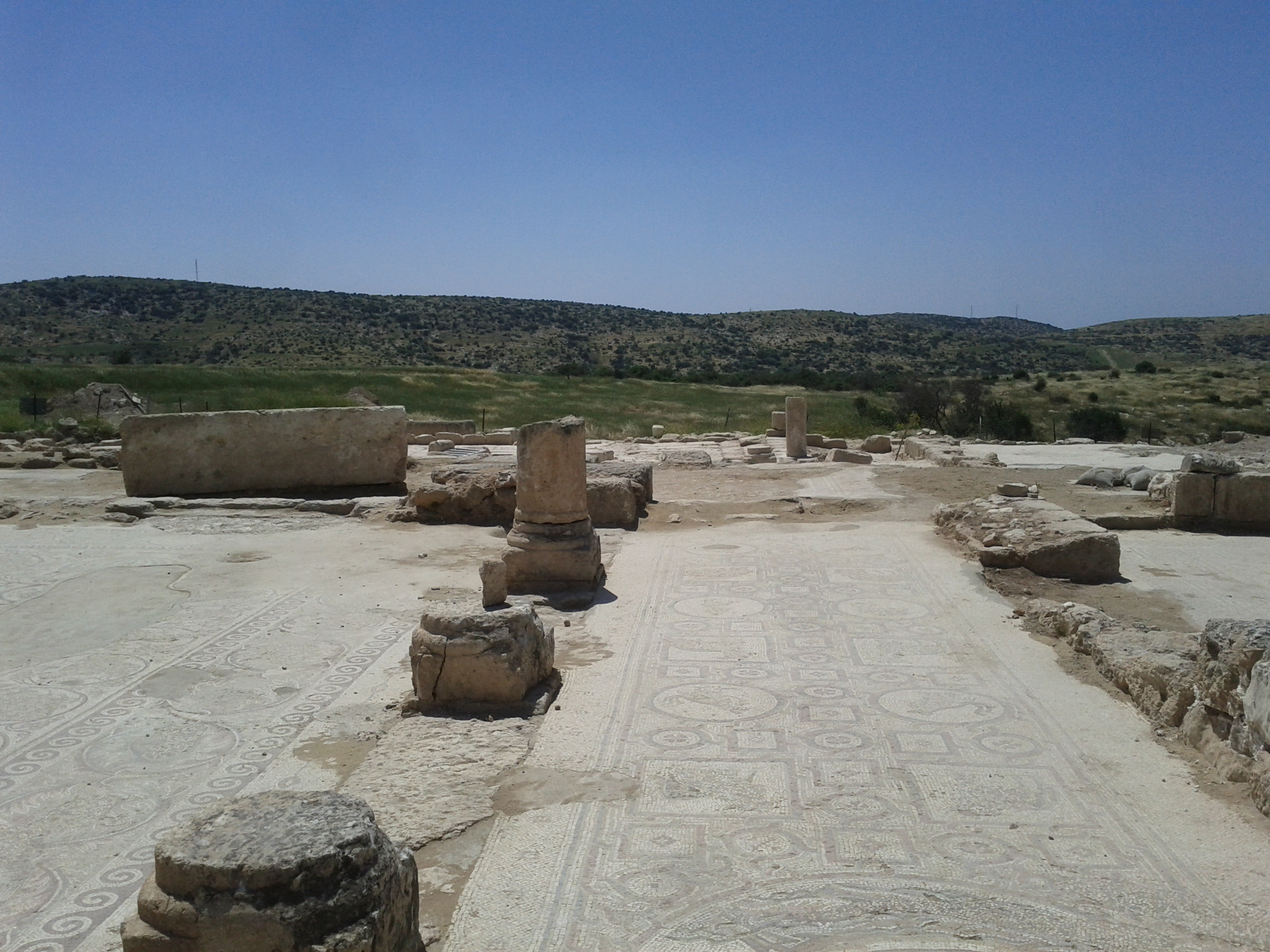 מבט מהכנסייה הביזנטית בבית לויה